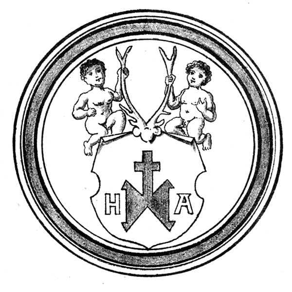 Wappen der Heilbronner Patrizier Albrecht